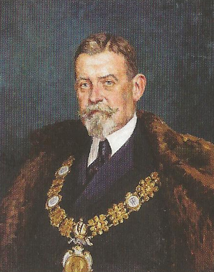 Porträt von Max von Ferstel (1859–1936), Rektor der Technische Hochschule Wien